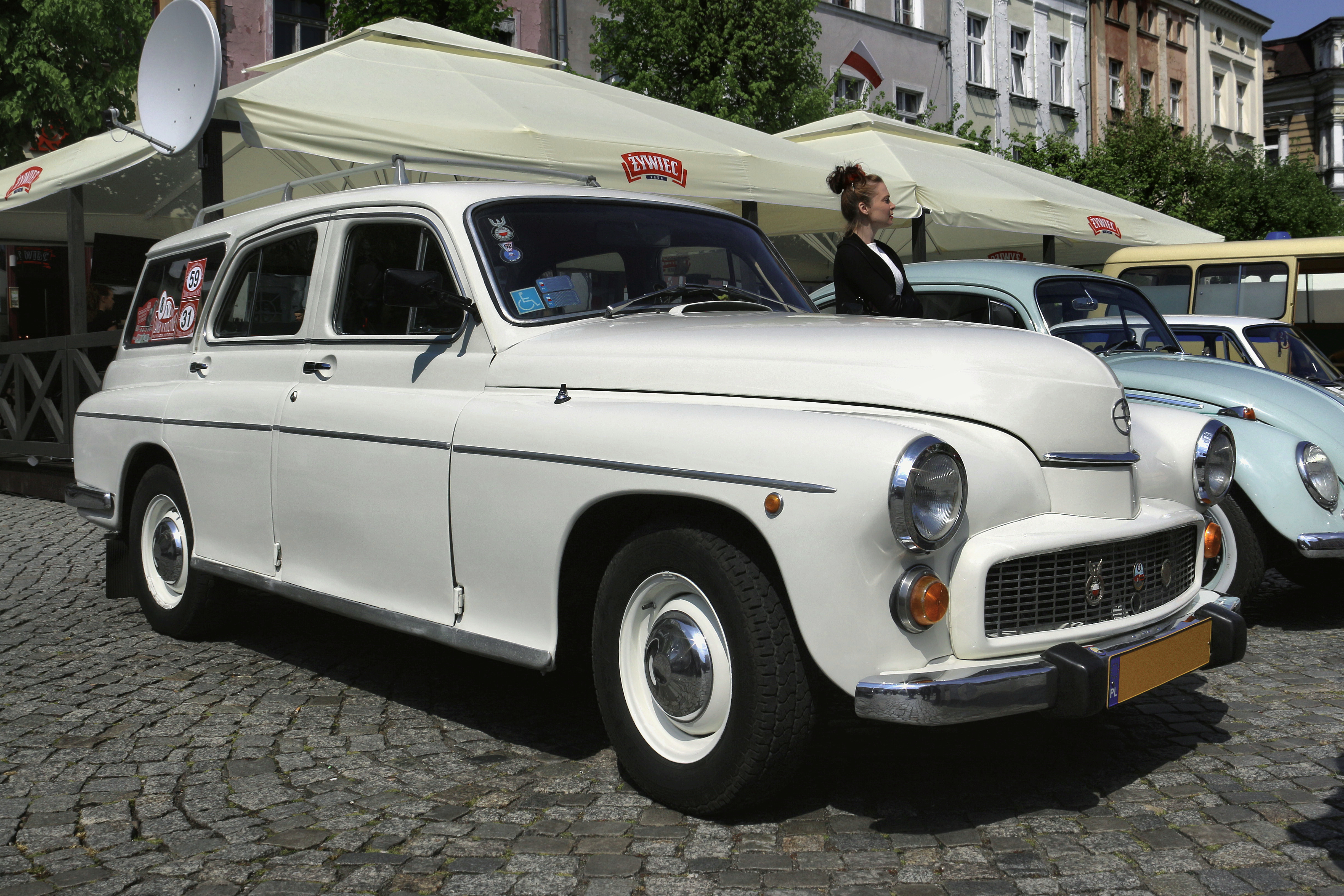 FSO Warszawa 223K